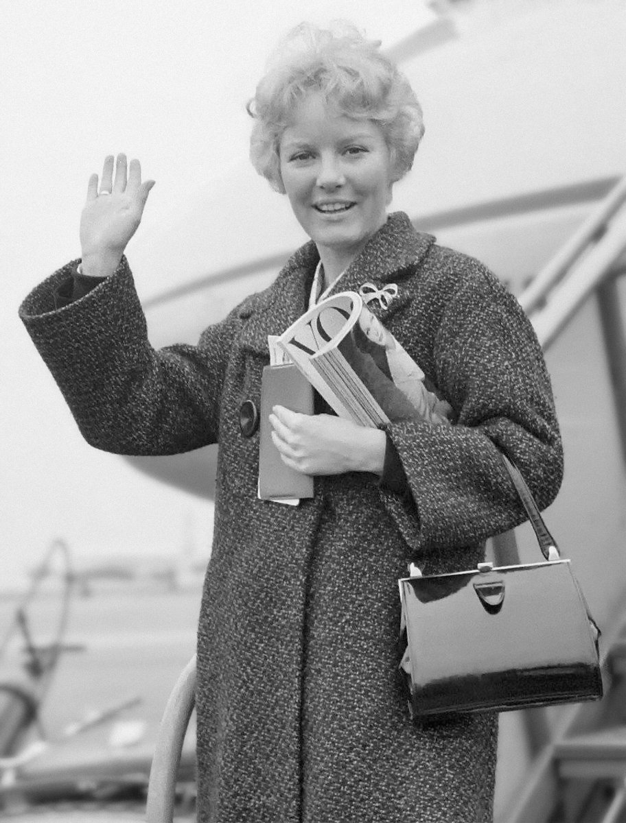 Collectie / Archief : Fotocollectie Anefo Reportage / Serie : [ onbekend ] Beschrijving : Aankomst Petula Clark op Schiphol Datum : 18 maart 1960 Locatie : Amsterdam, Noord-Holland Trefwoorden : AANKOMST Persoonsnaam : Clark, Petula Fotograaf : Lindeboom, Henk / Anefo Auteursrechthebbende : Nationaal Archief Materiaalsoort : Negatief (zwart/wit) Nummer archiefinventaris : bekijk toegang 2.24.01.03 Bestanddeelnummer : 911-1039